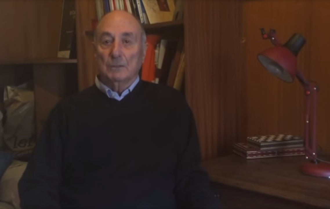 Francisco Frutos rememora a Dolores Ibarruri en el aniversario de su fallecimiento ¿2014?.